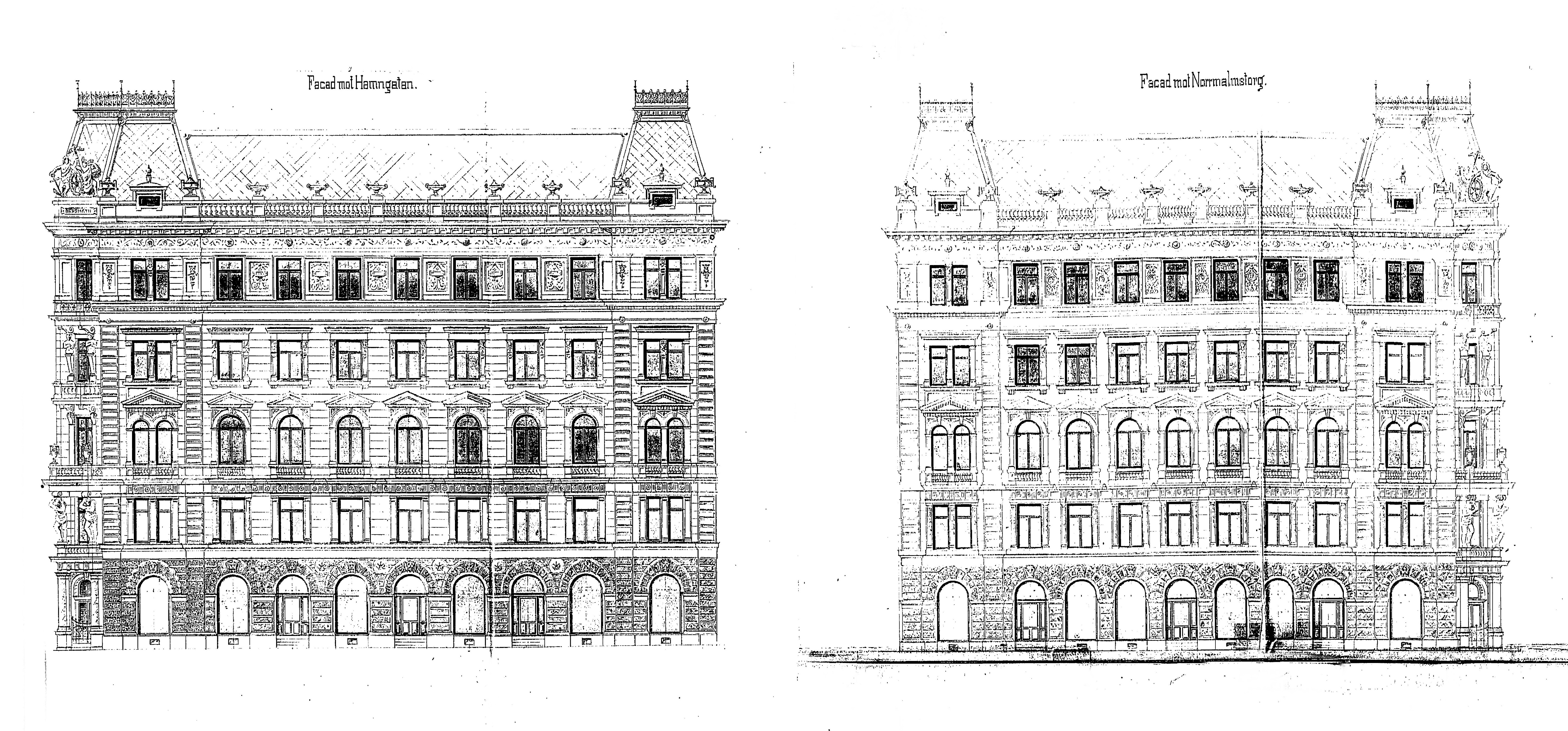 Skravelberget mindre 9, ritning fasader